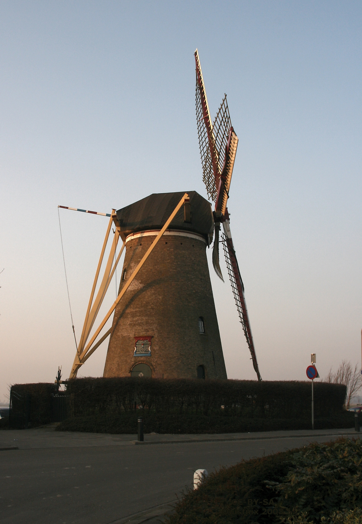 Nieuwe-Tonge: molen d'Oranjeboom vanaf het ZW